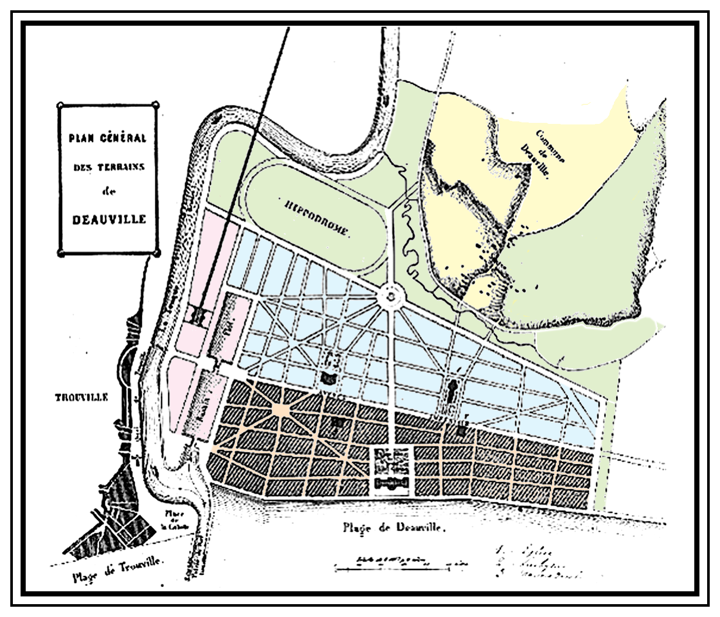 projet d'urbanisme pour la ville nouvelle de Deauville (mise en couleur par mes soins)